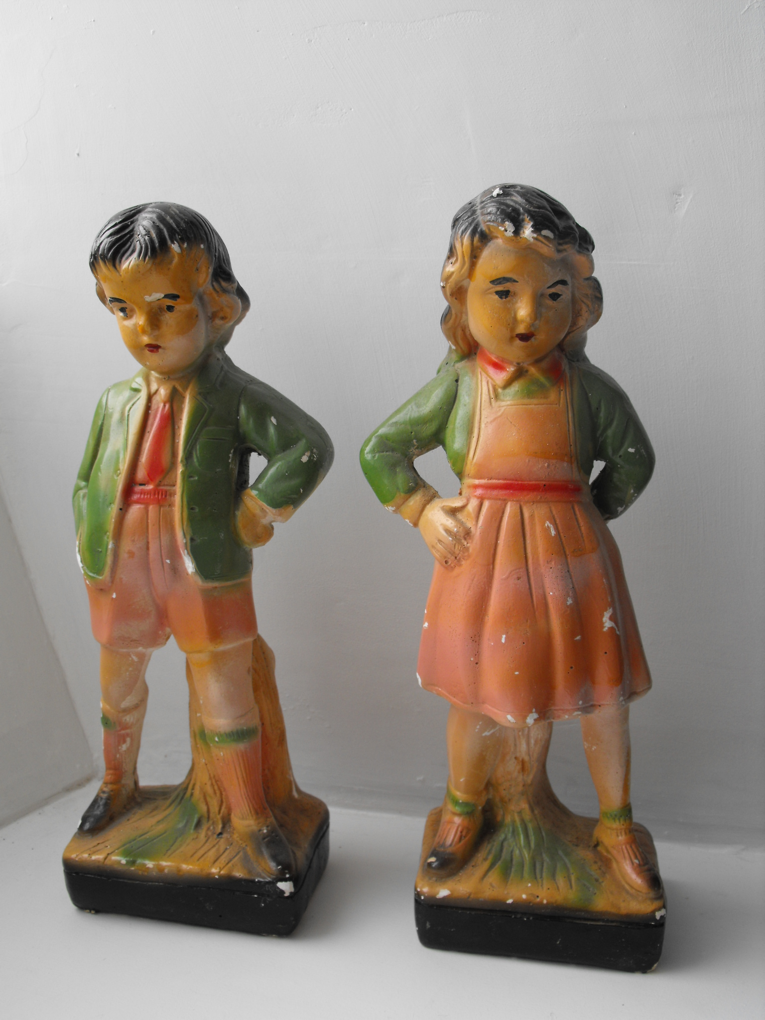 Chalkware boy & girl